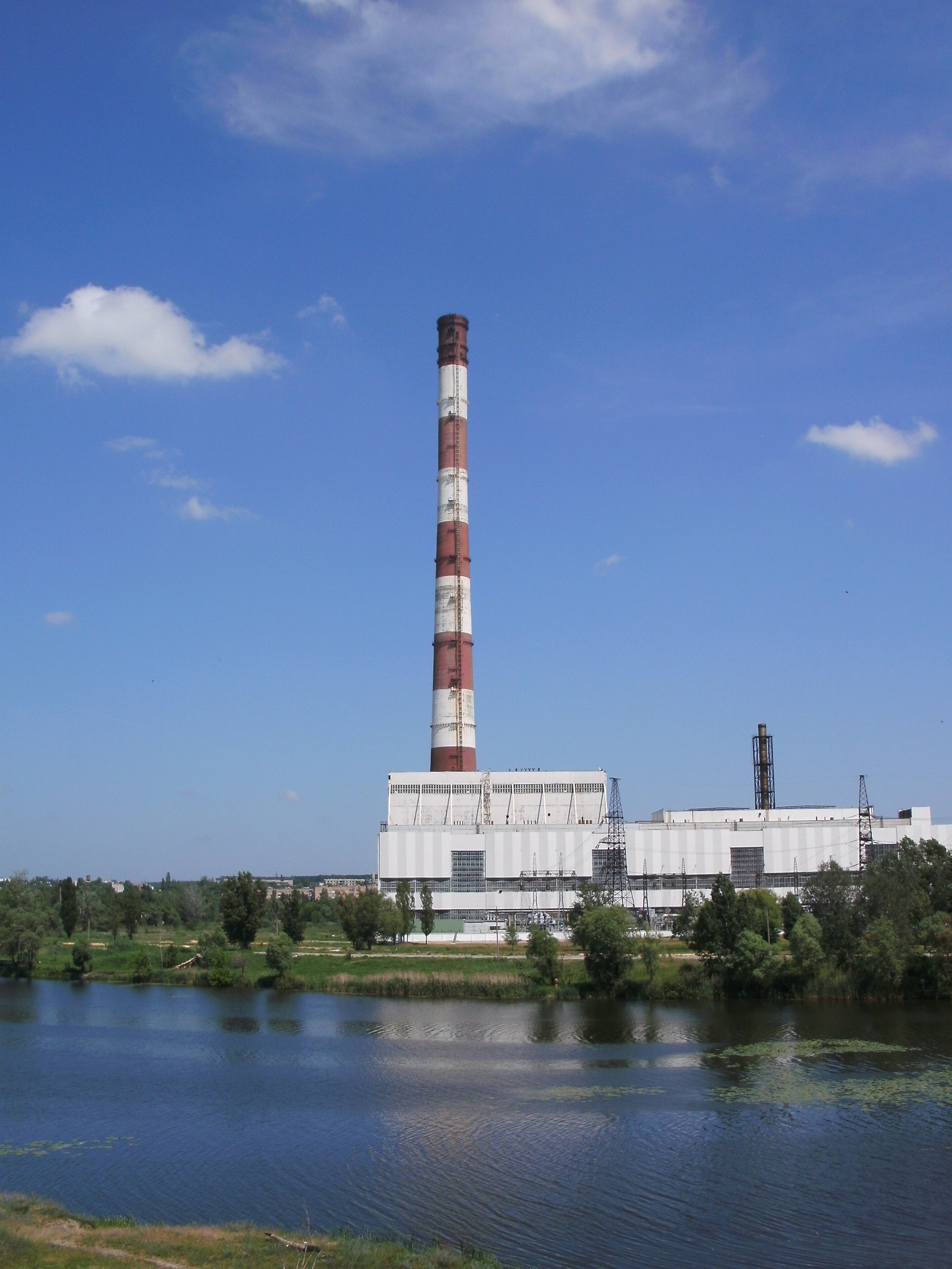 Харьковская ТЭЦ-5.